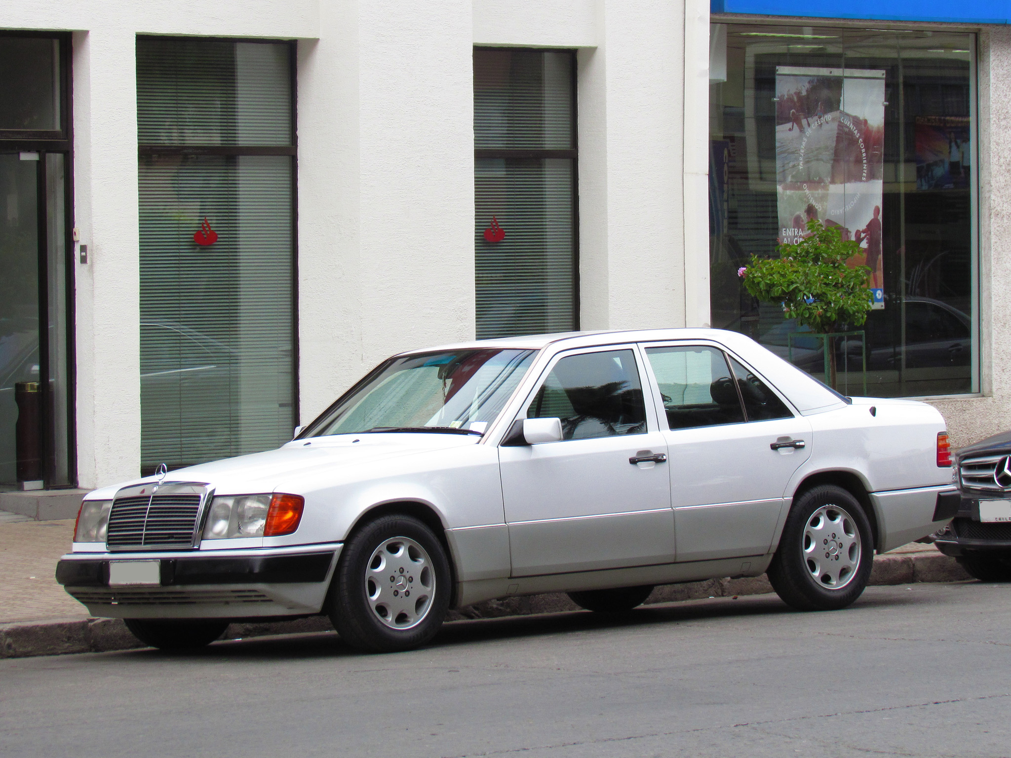 Mercedes Benz 300 E-24 1993